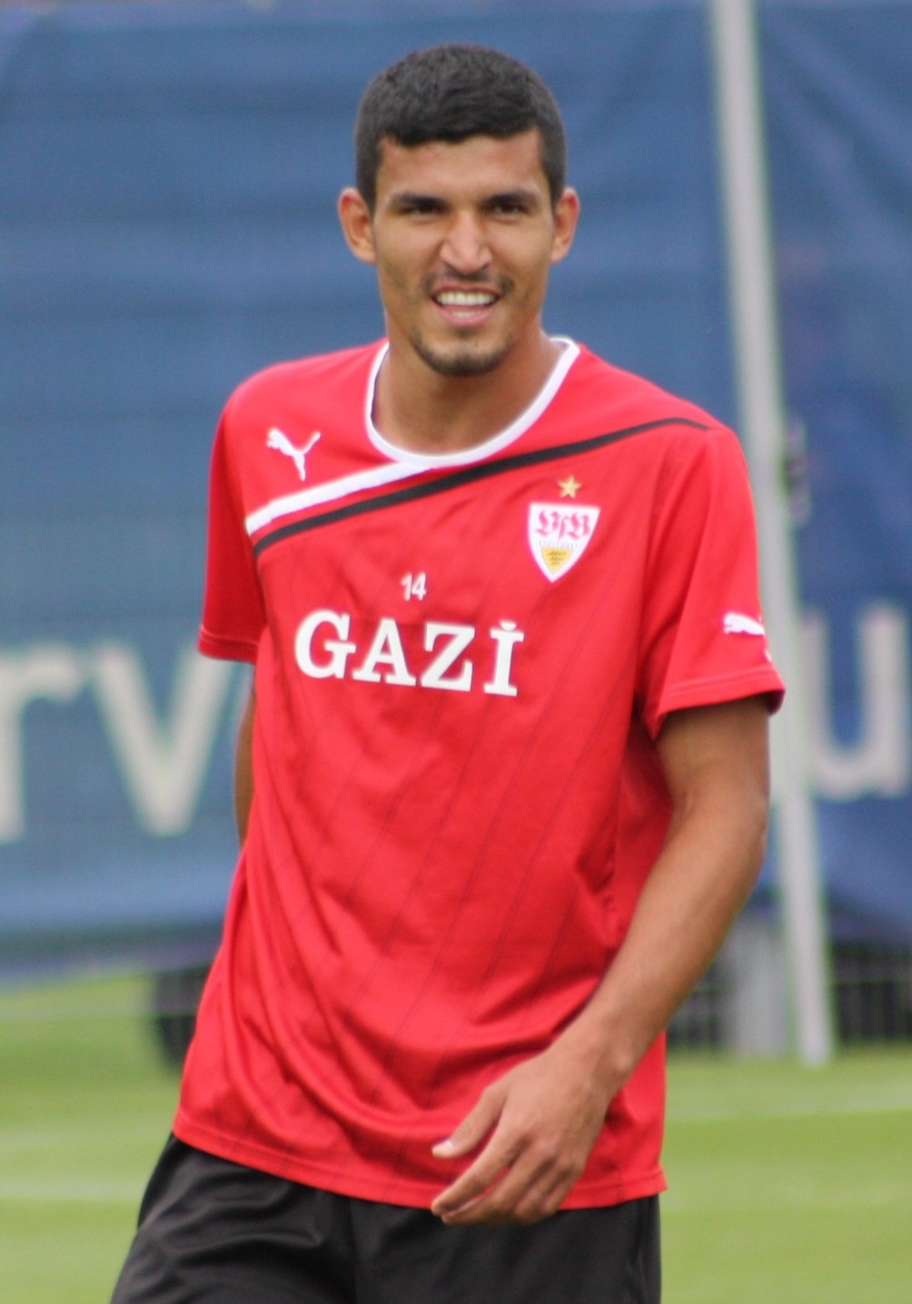 Maza, aufgenommen beim VfB-Training von